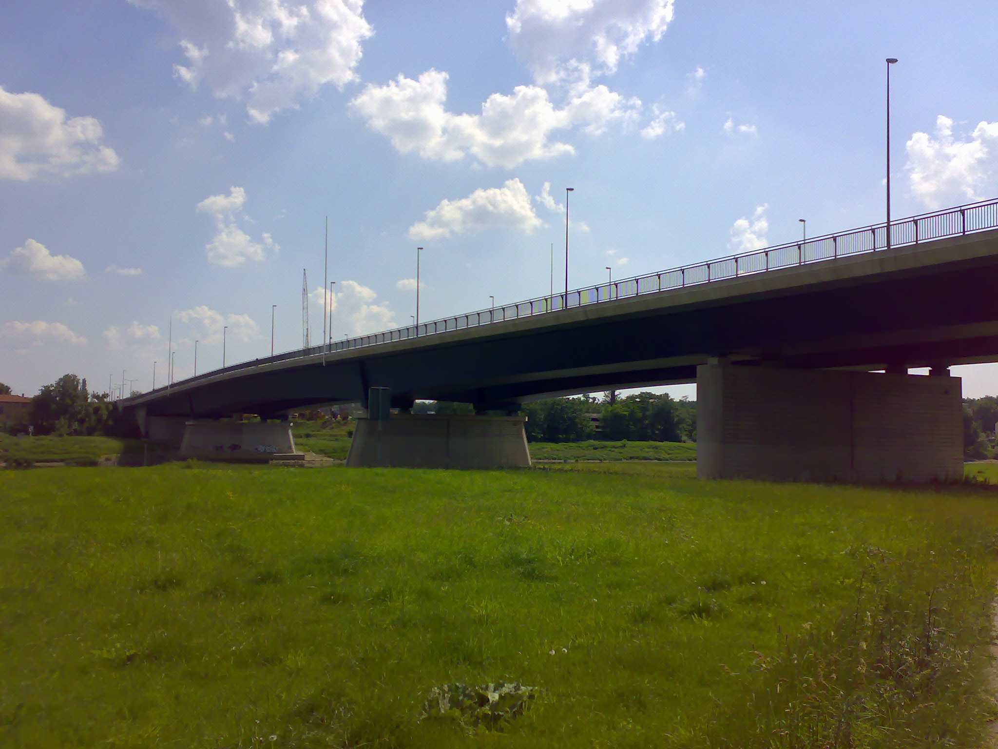 Flügelwegbrücke von der Übigauer-Seite aus gesehen